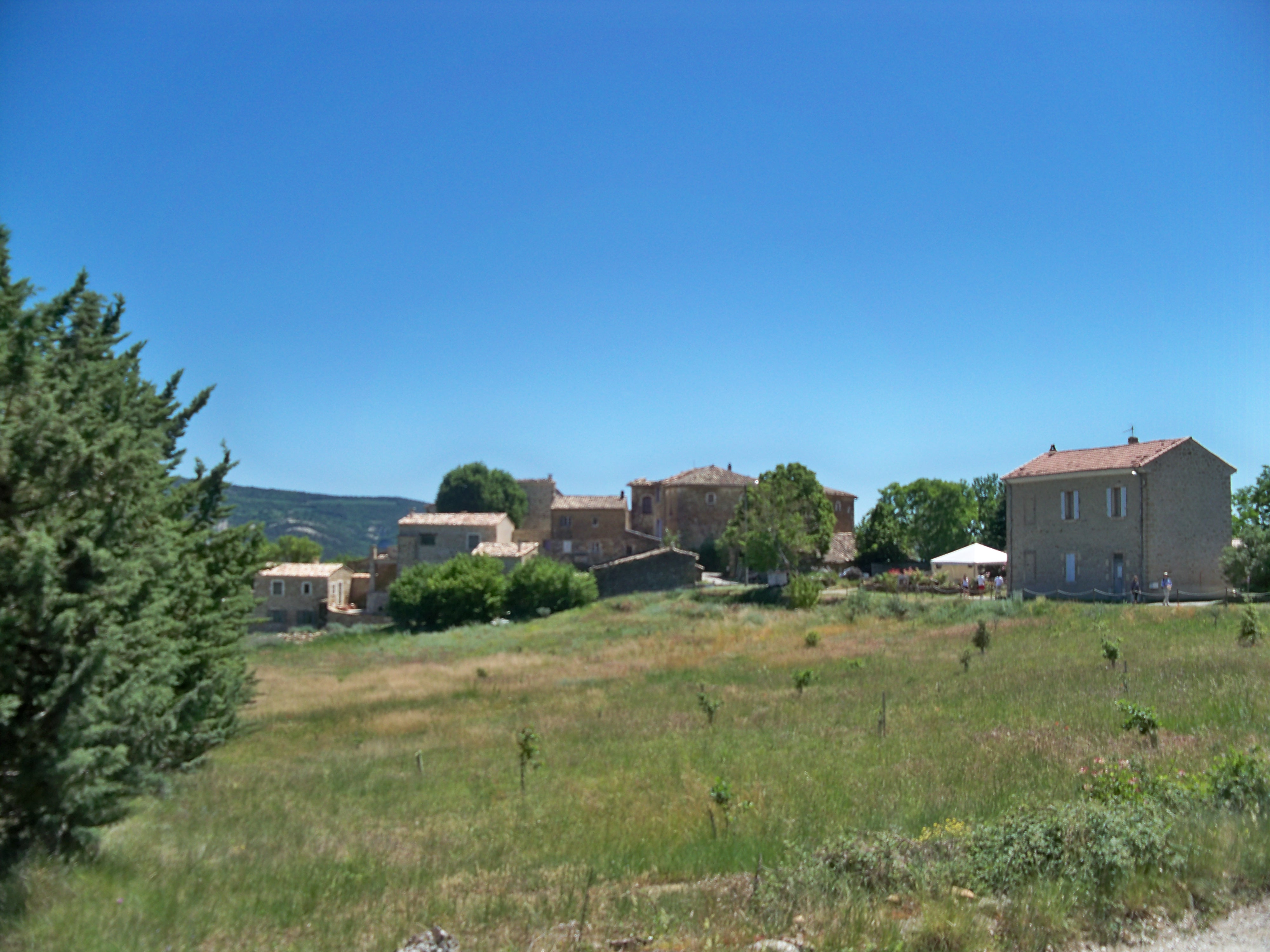 Hameau de Boulinette, Simiane la Rotonde (04)